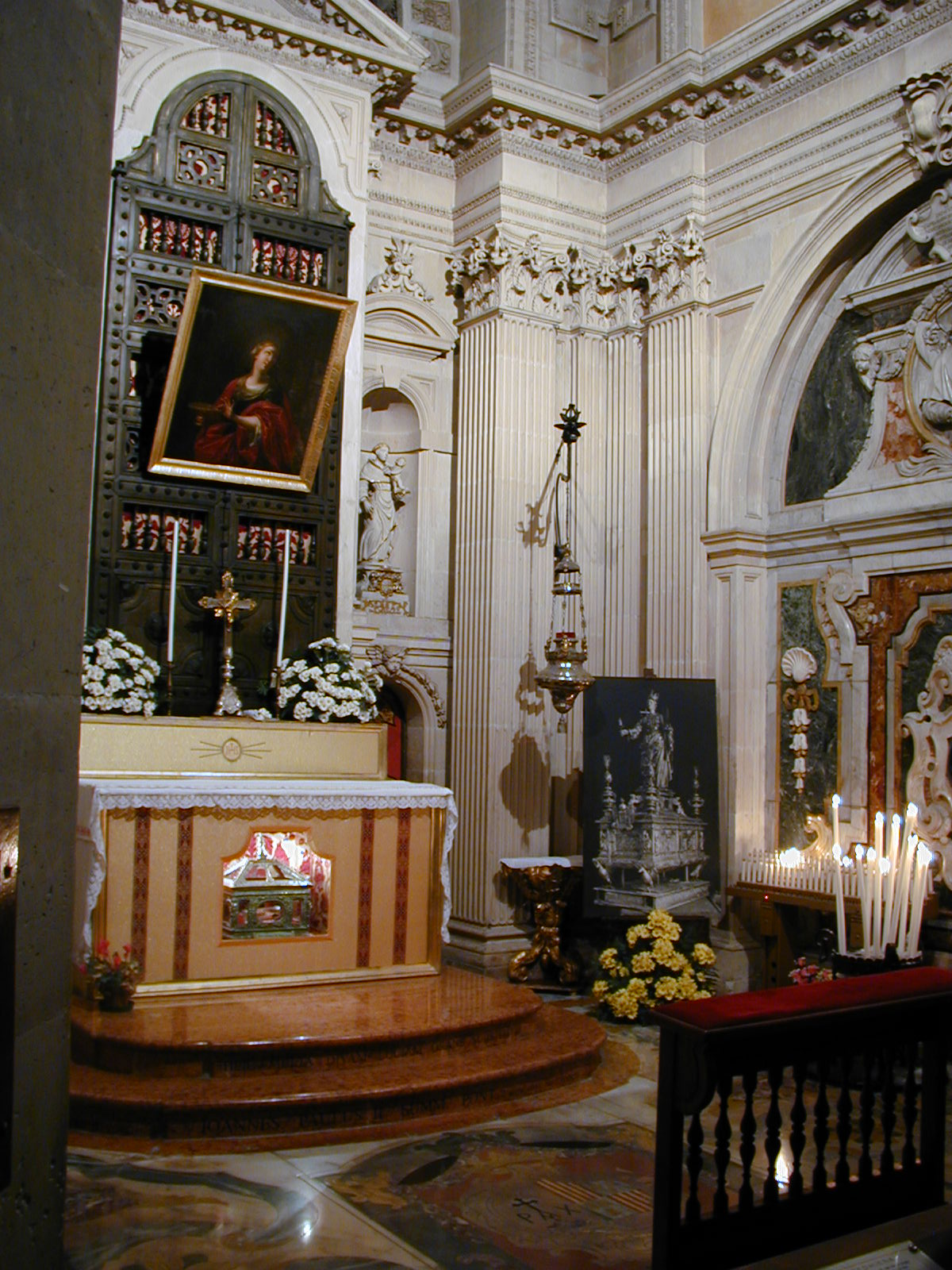 Cappella di Santa Lucia - Duomo di Siracusa